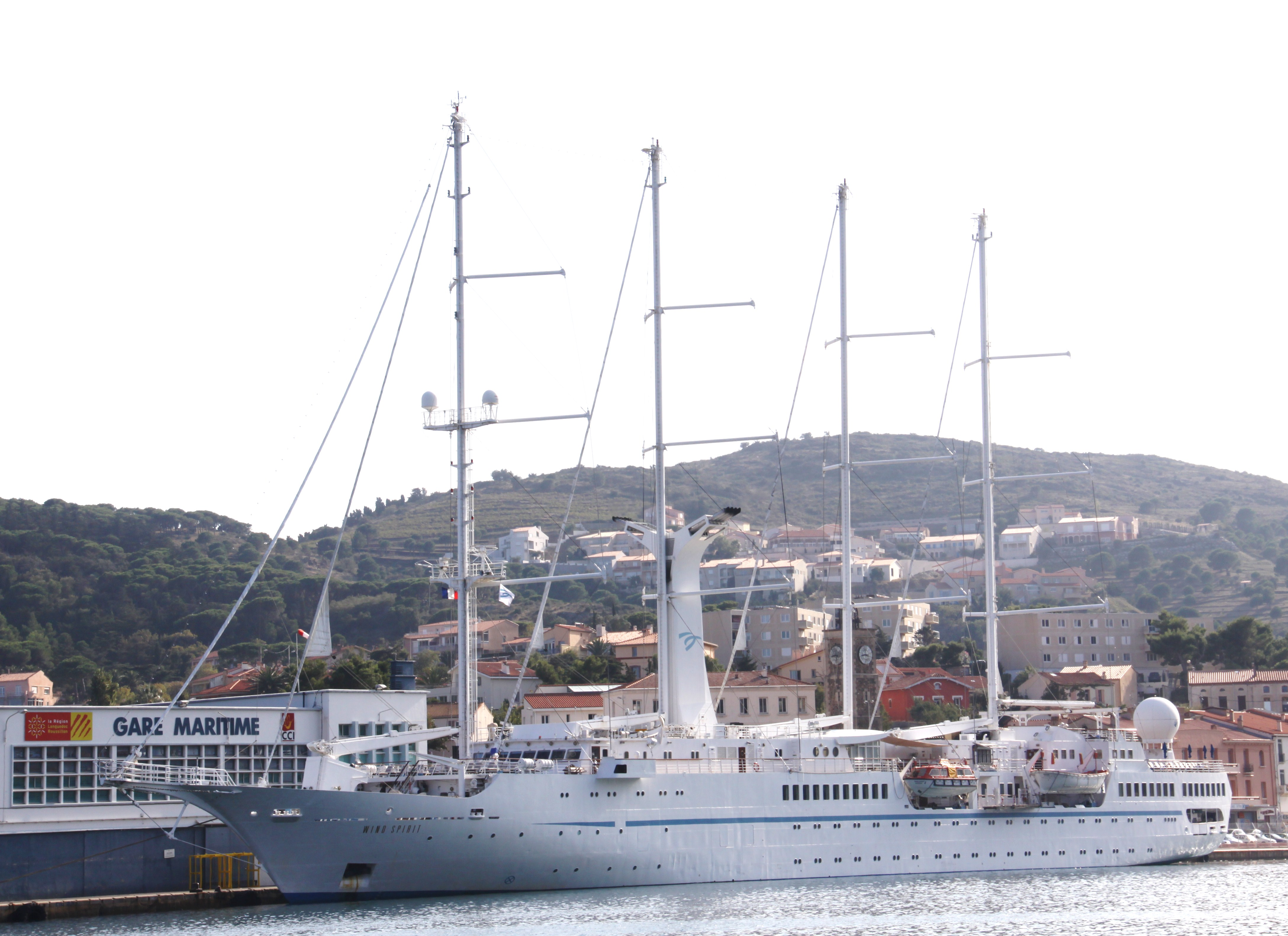 Le voilier de croisière (goélette à quatre mâts) Wind Spirit en escale au Port de Port-Vendres et accosté au Quai de la Douane. Port-Vendres, Pyrénées Orientales, France.